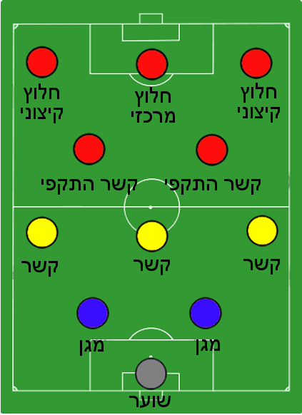 Metodo